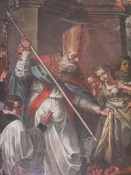 San Leone Taumaturgo che sconfigge il mago Eliodoro. Olio su tela del secolo XVIII di Matteo Desiderato. Chiesa Madre di Santa Maria di Licodia.